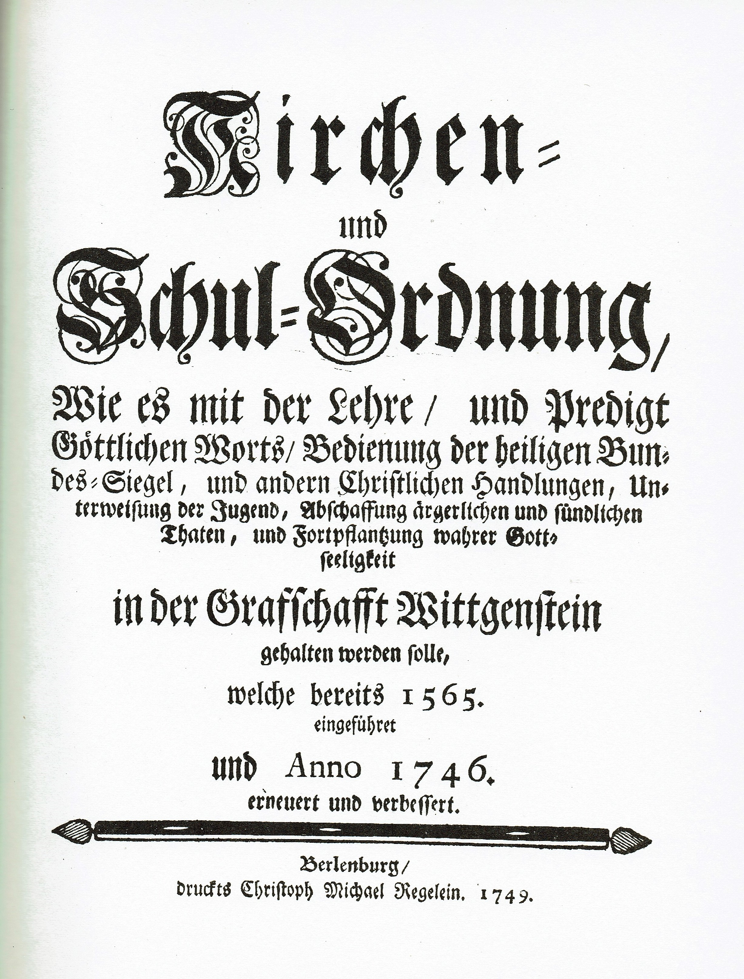 Kirchen- und Schulordnung der Grafschaft Sayn-Wittgenstein-Hohenstein von 1746